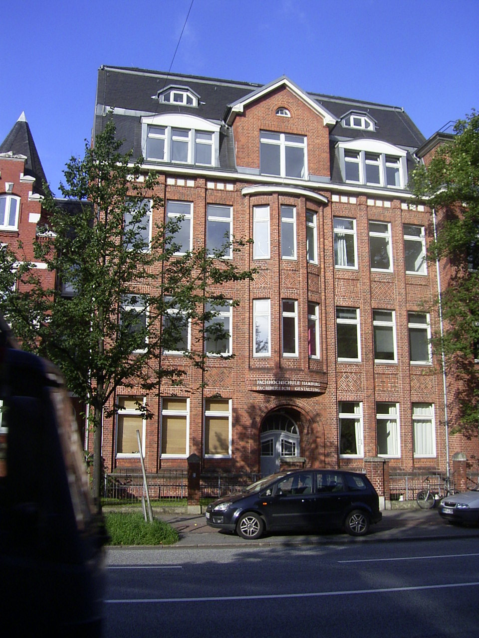 Der Fachbereich Gestaltung der Hochschule für Angewandte Wissenschaften hat seinen Sitz an der Wartenau 15 in Hohenfelde.